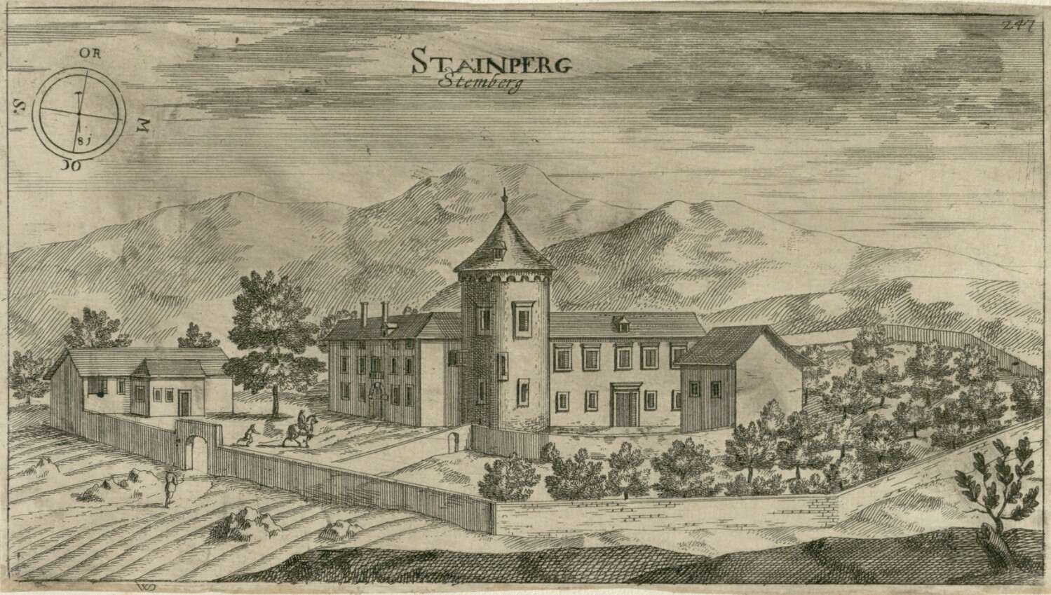 Grad Kalec